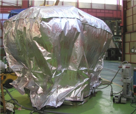 Nachweis der integralen Dichtheit mit dem Vakuumverfahren A1 der DIN EN 1779hren